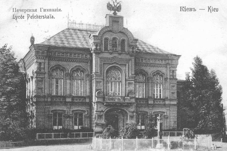 П'ята київська гімназія (Києво-Печерська). Поштова картка 1899 року.